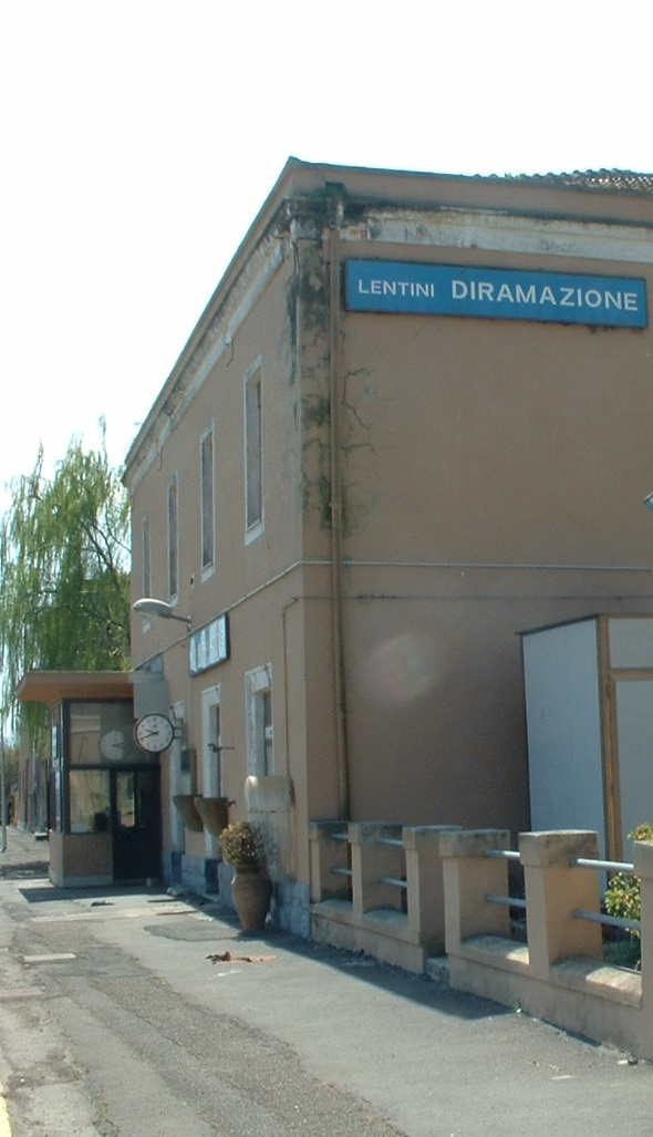 Lentini Diramazione Railway Station Internal view(1869)